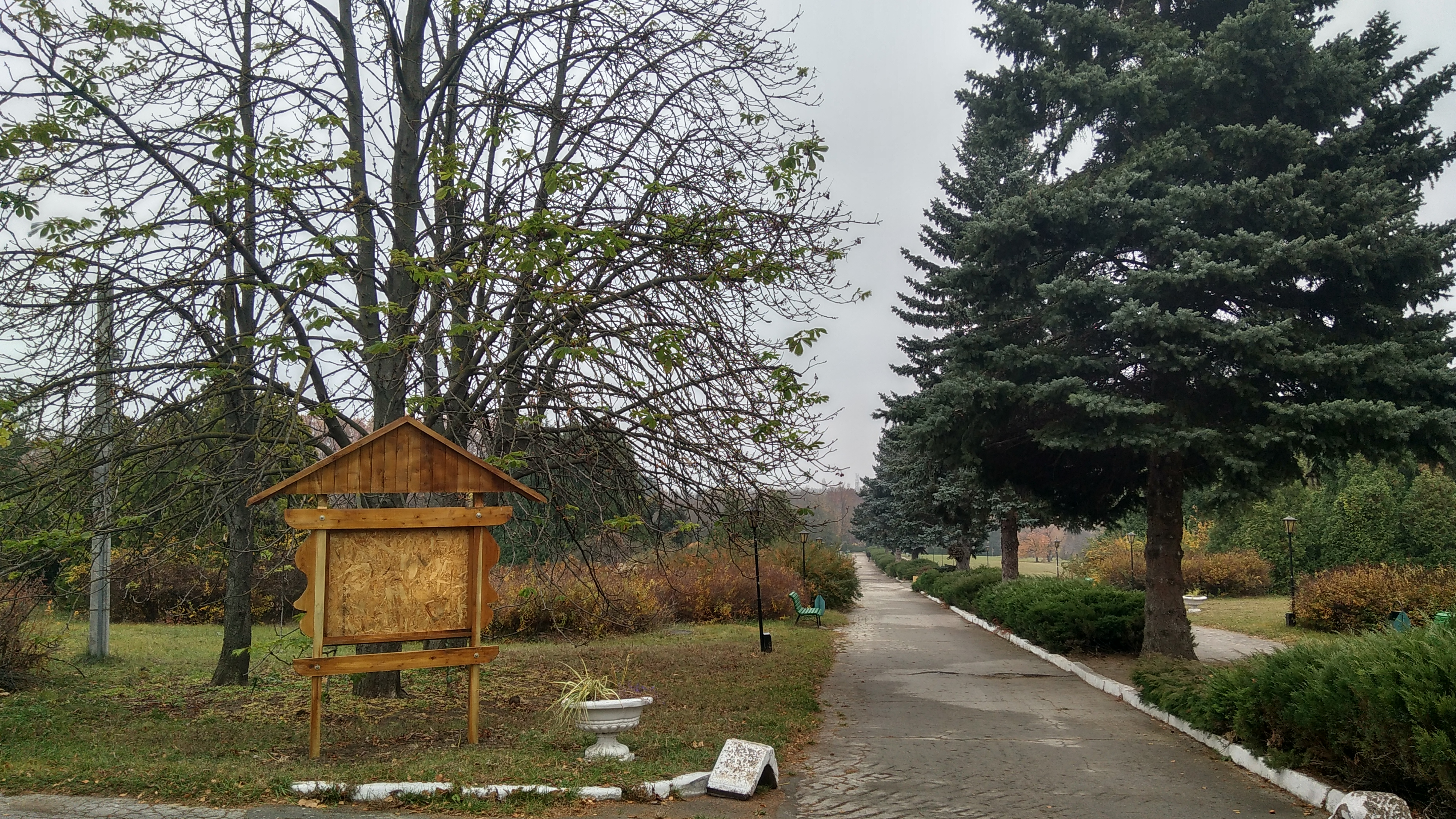 Imagine din Grădina Botanică din Chișinău